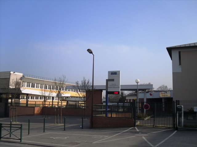 Le collège André Maurois d'Epinay-sur-Orge (91)